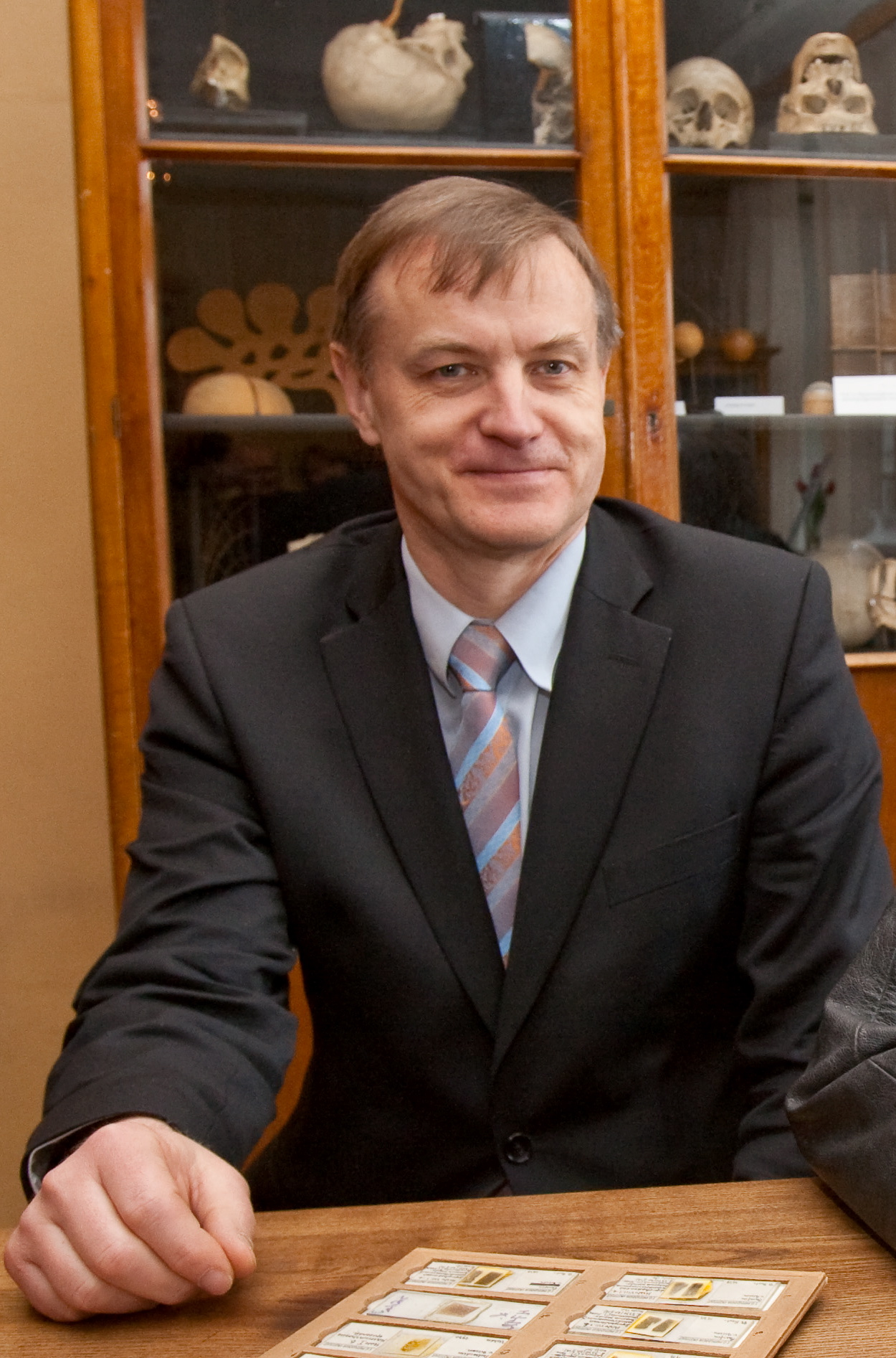 TÜ anatoomiainstituudi professor Andres Arend 23. aprillil 2009 August Rauberi vahakuju esitlusel pärast Vana Anatoomikumi ringauditooriumis toimunud professor A. Rauberi päeva pidulikku konverentsi.